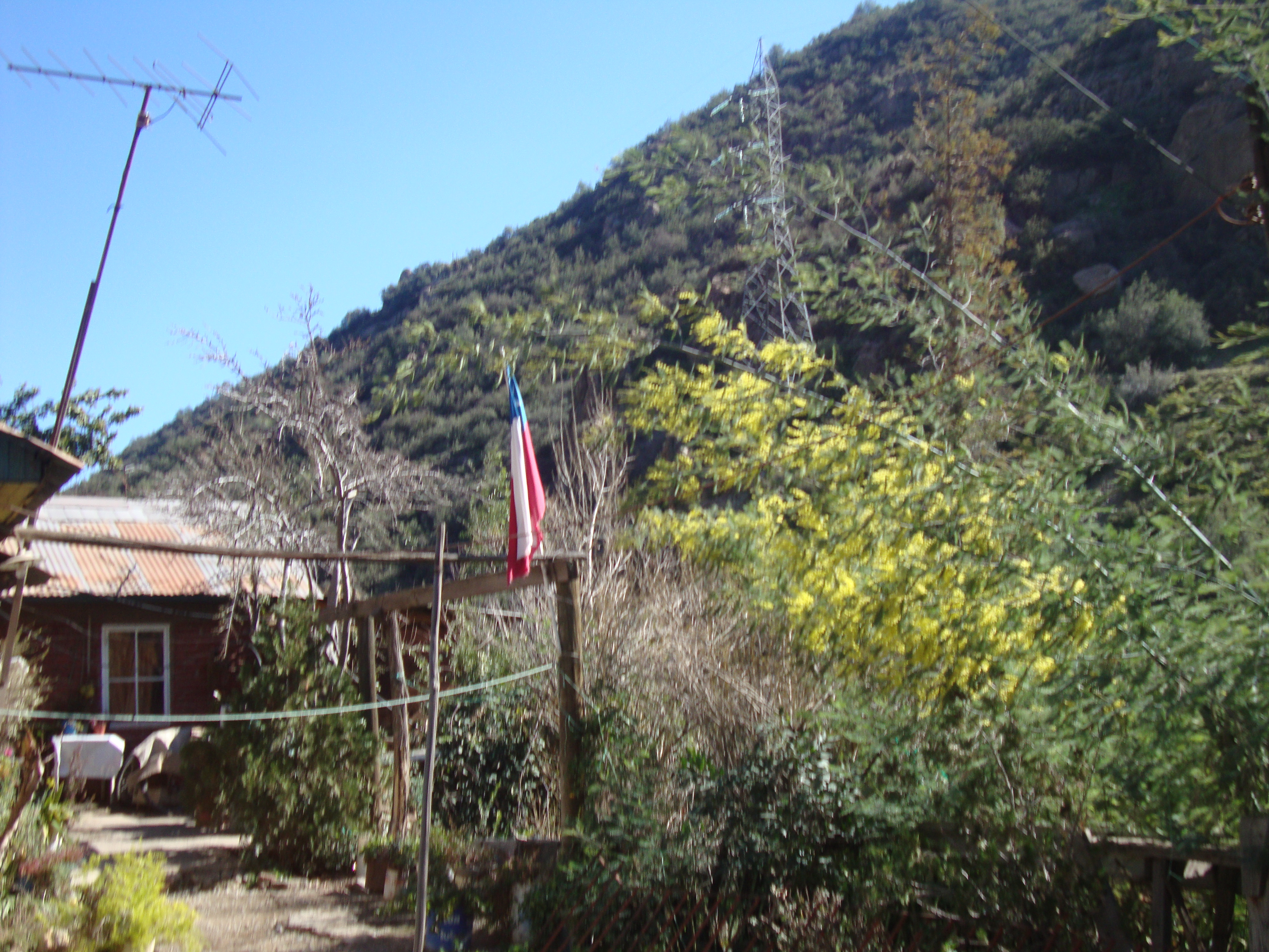 Corral Quemado es una localiad de la Precordillera (Andes) de Santiago de Chile